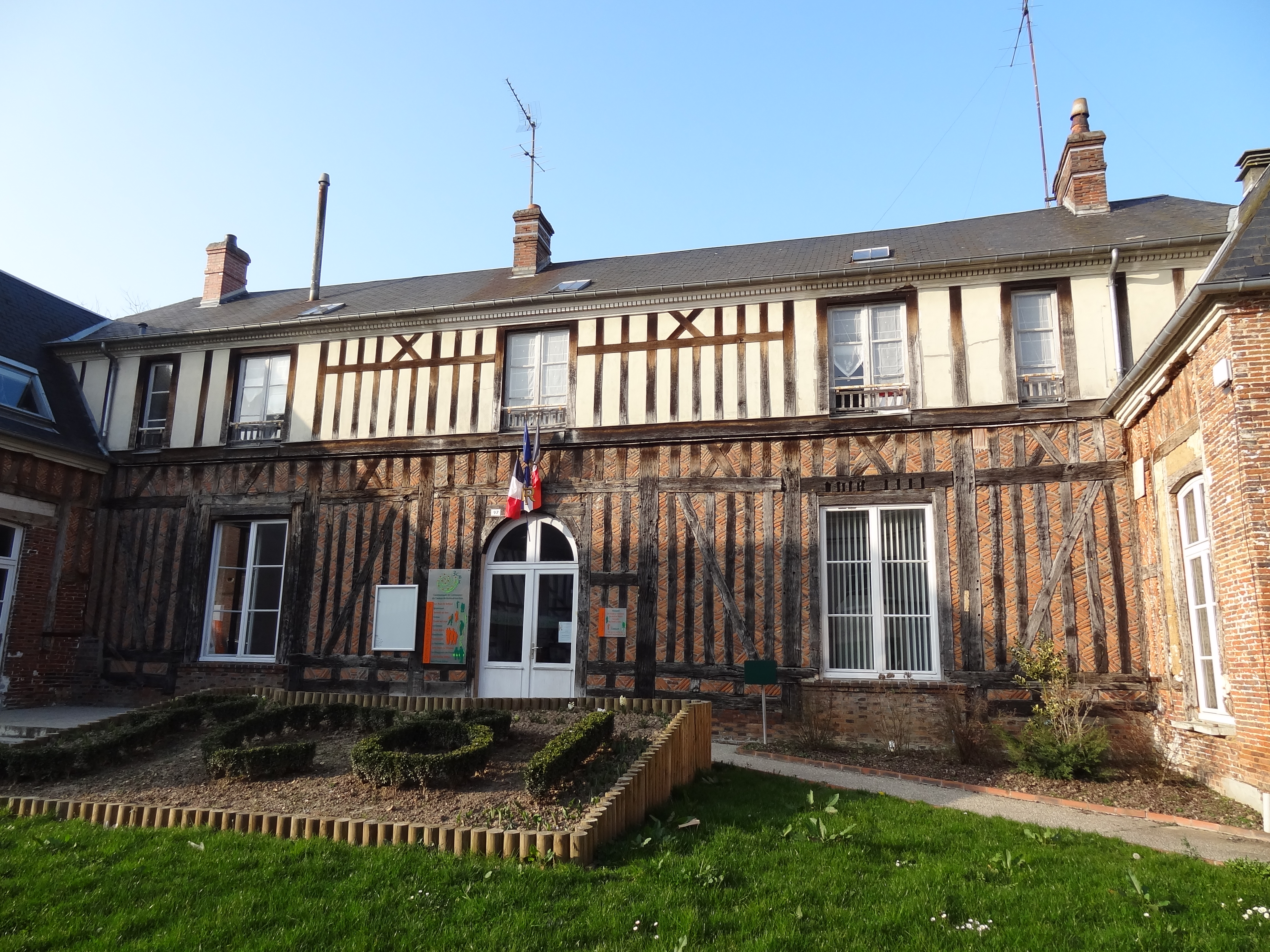 Photo de la ville de Breteuil